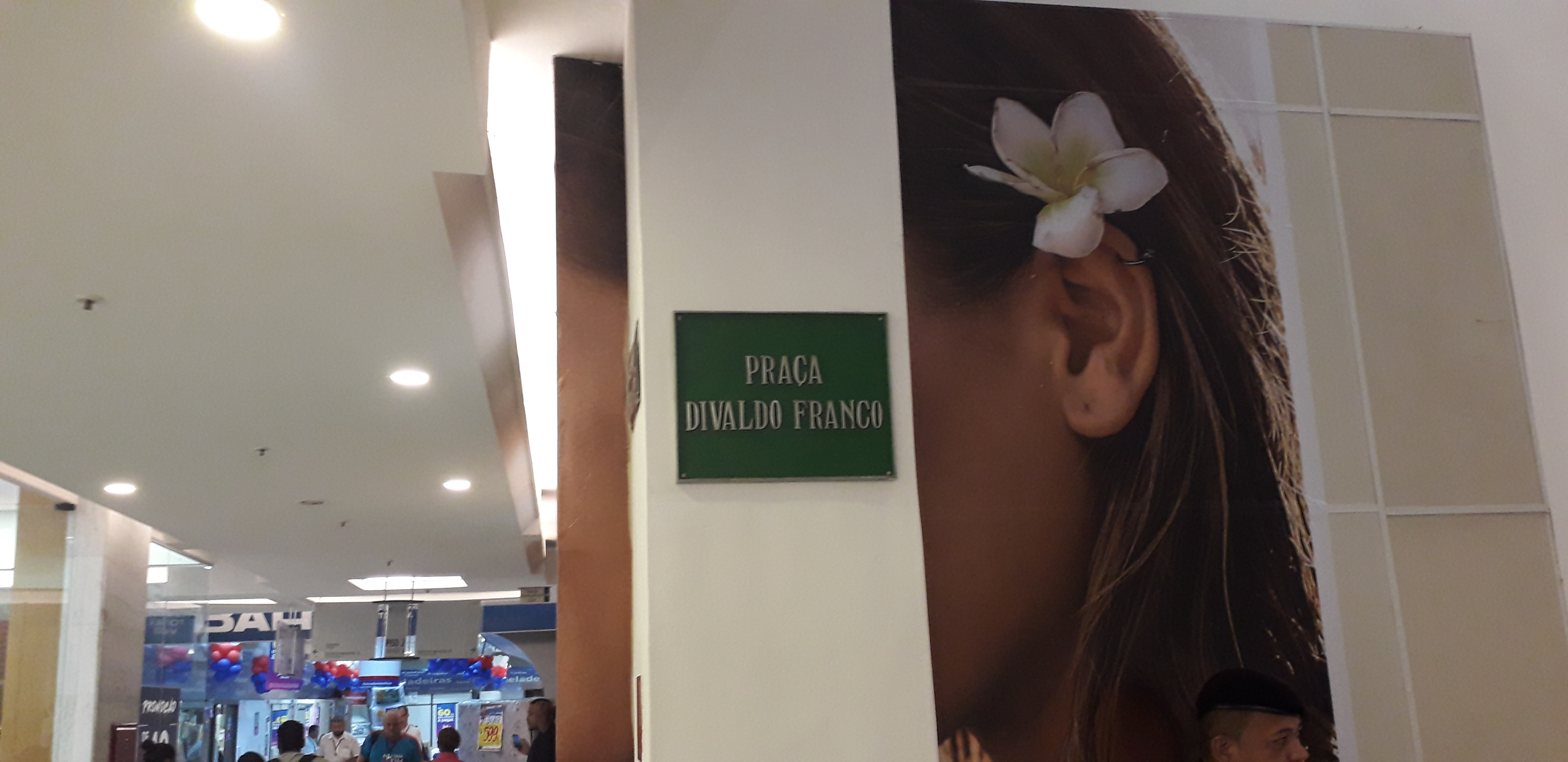 Placa em homenagem à Divaldo Franco no Shopping da Bahia, onde nomeia praça daquele centro de compras em Salvador, BA